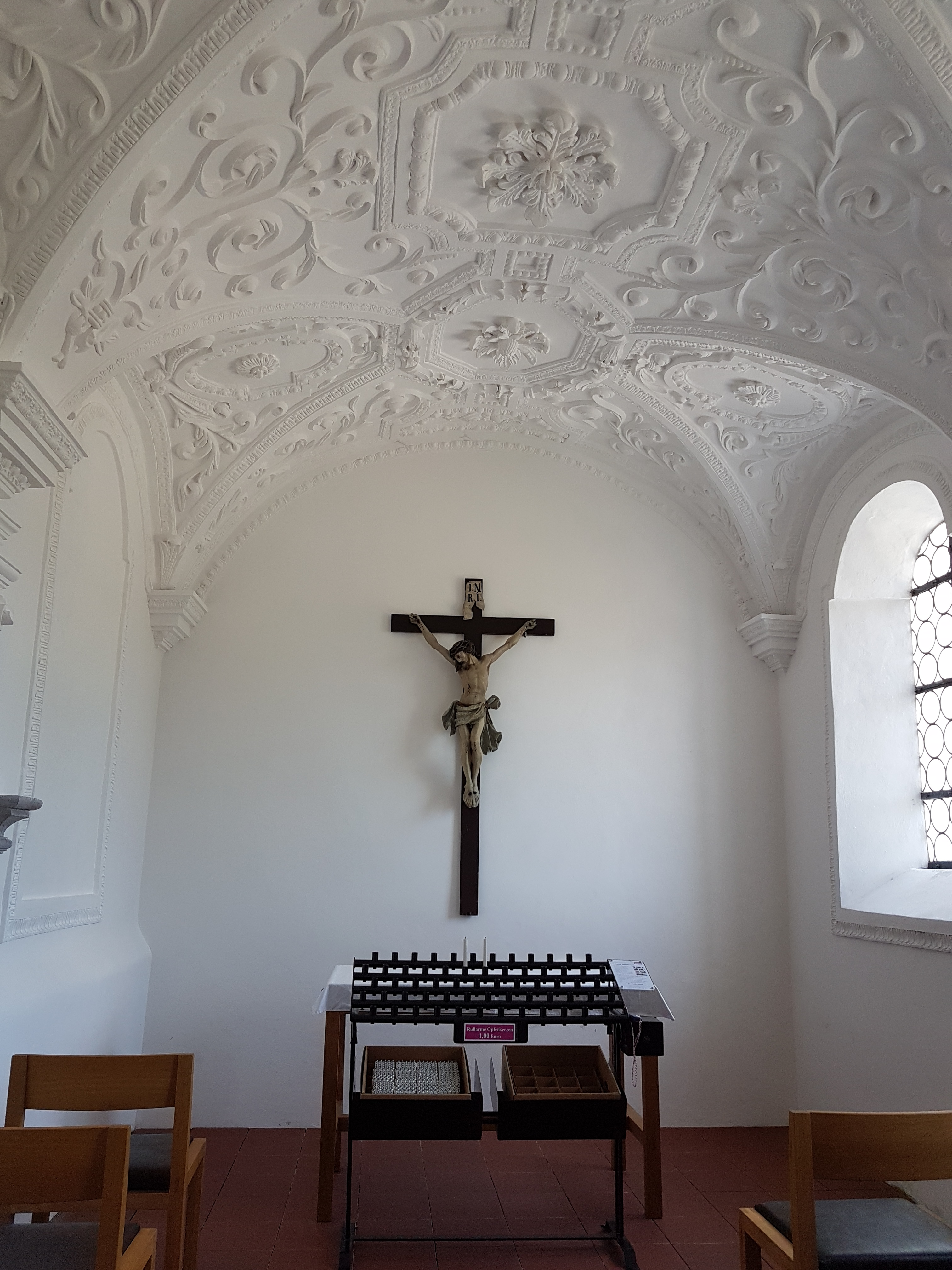 Burggen, Pfarrkirche St. Stephan, Nebenkapelle